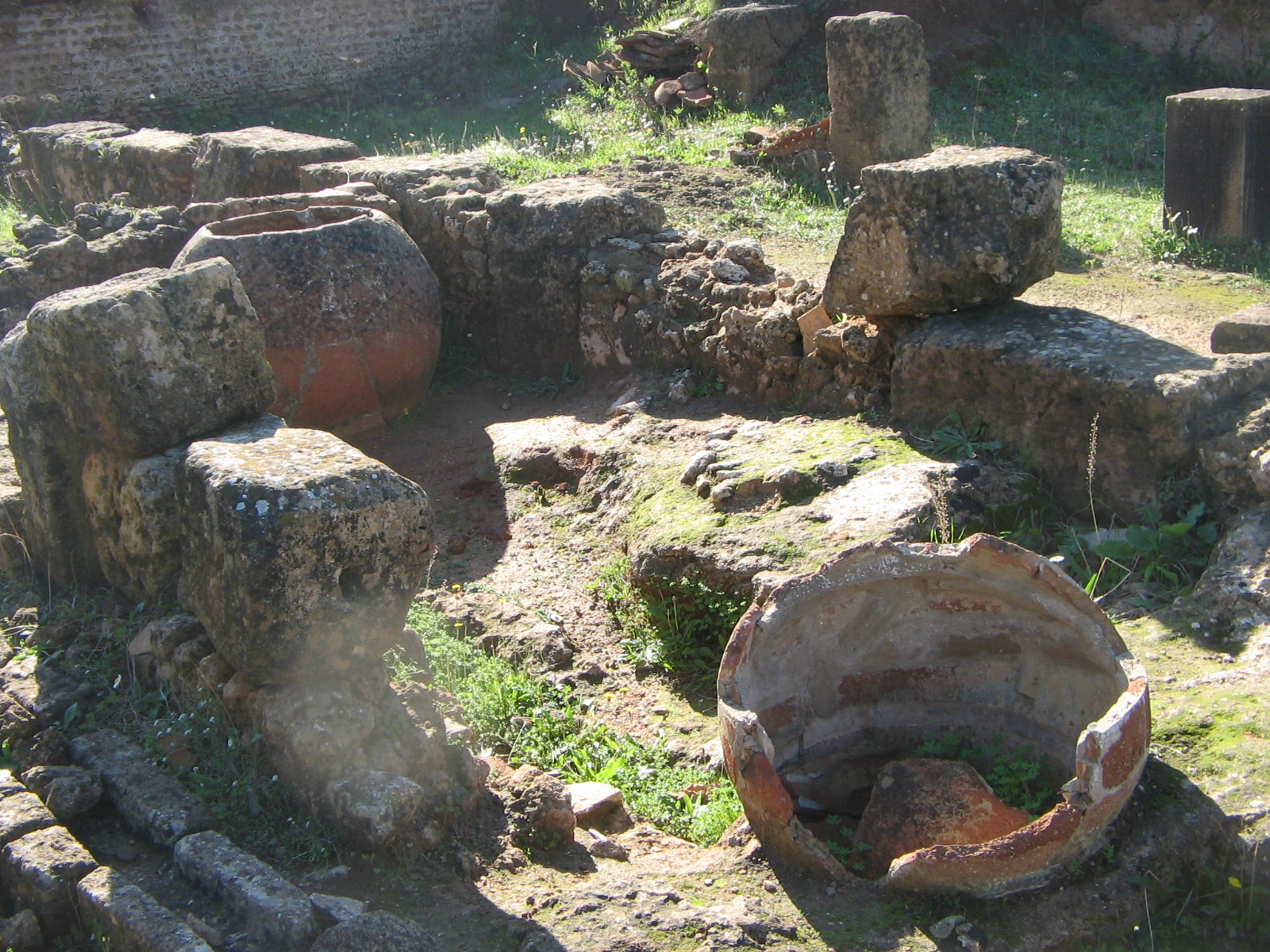 At Fabrique de Garum on 'Visite de Tipaza' (36.594196,2.443268)+9m. Fabrique de Garum